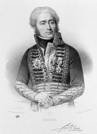 Louis François Foucher, comte de Careil, baron de l'Empereur (1762-1835)